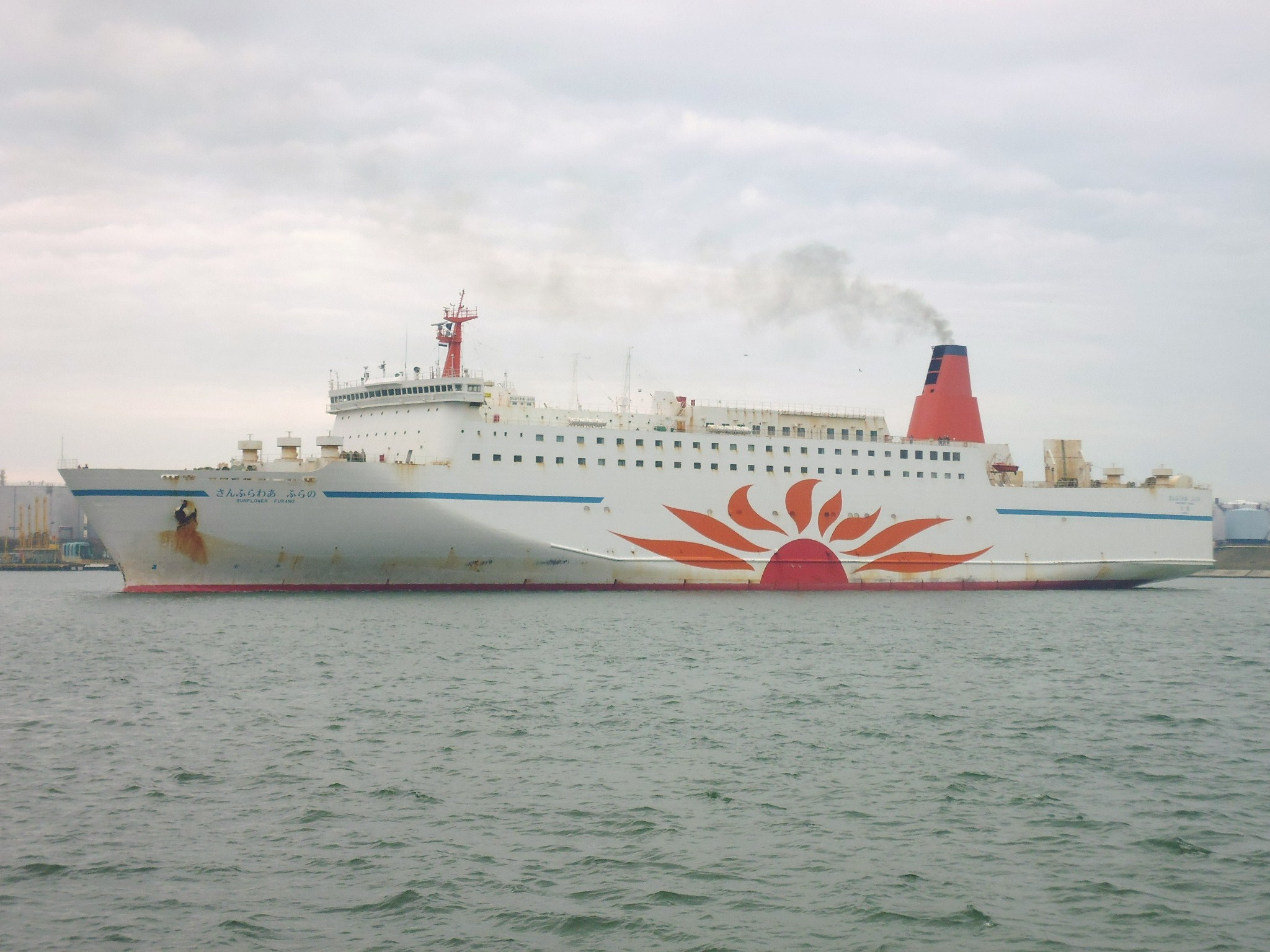 初代さんふらわあふらの（苫小牧西港フェリーターミナル入港時、入船公園より撮影）